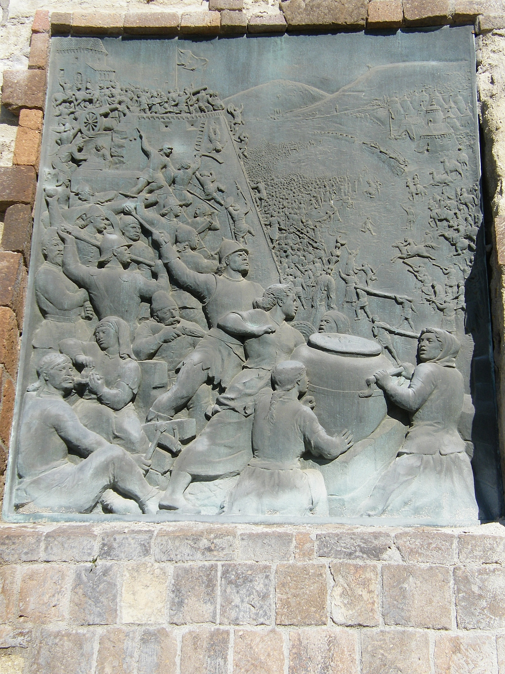 Erődrendszer romjai (Eger, Szervita utca, Dobó István utca, Bástya utca, Vécsey Sándor utca) This is a photo of a monument in Hungary, Identifier: 17237